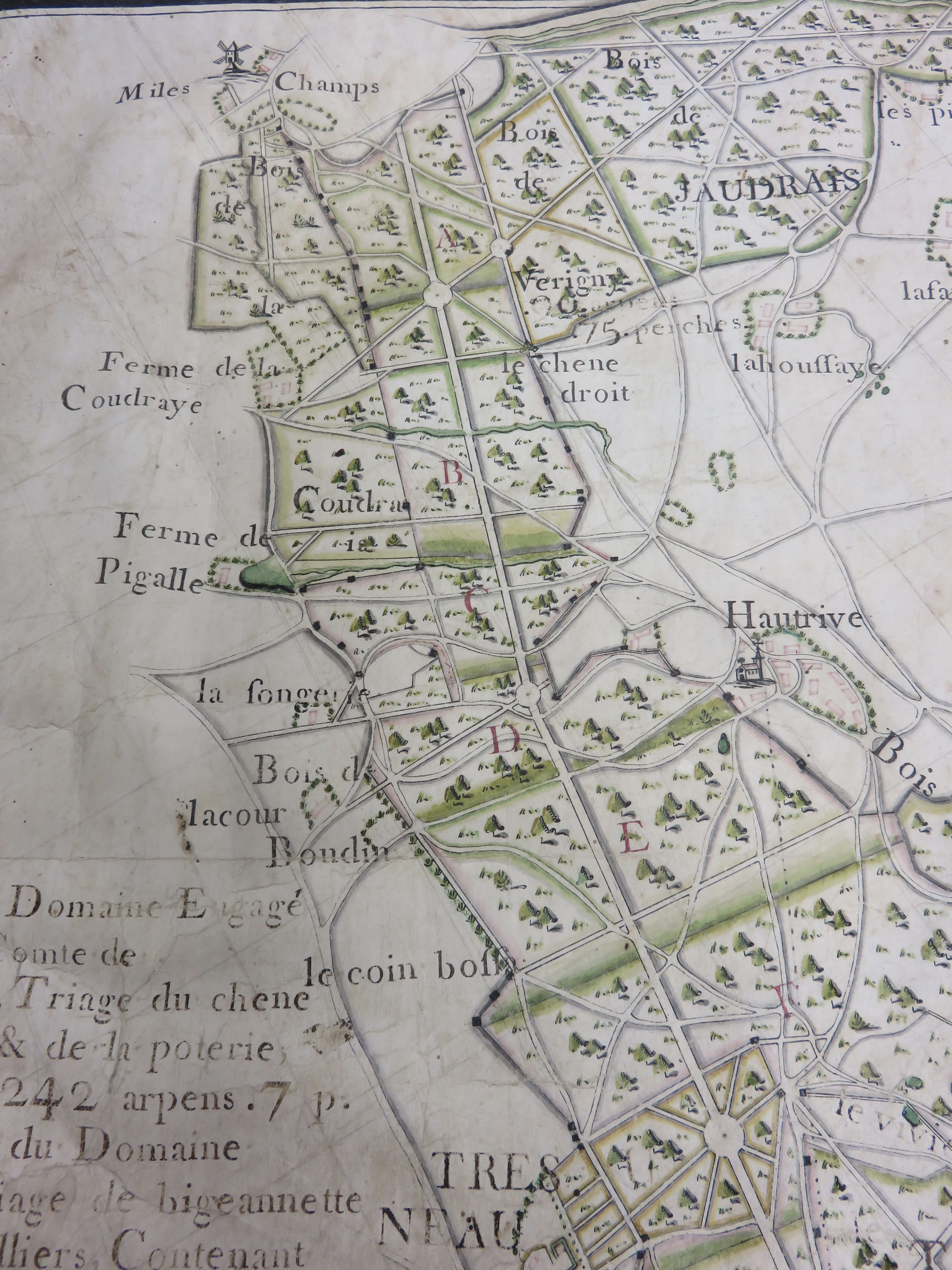 Cette carte générale des forêts et bois dans l'étendue de la maîtrise de Châteauneuf, postérieure à 1761, montre quelques unes des 8 fermes qui appartenaient à la seigneurie de Tresneau.